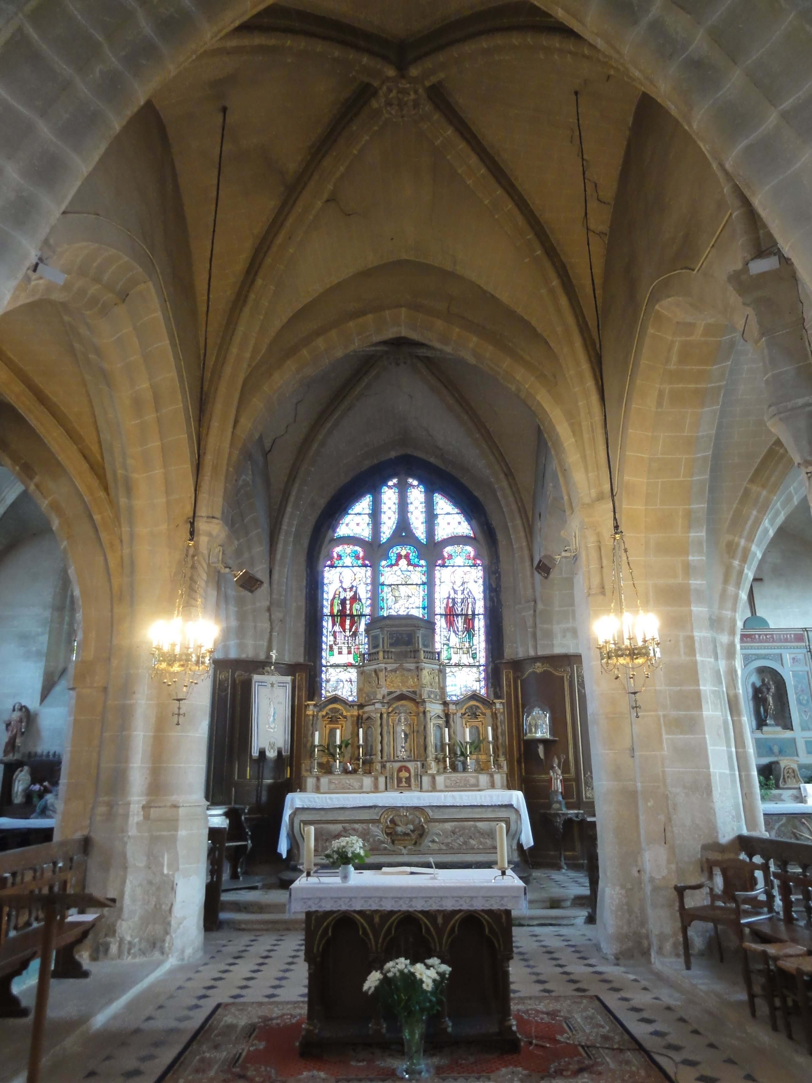 Intérieur de l'église (voir titre).